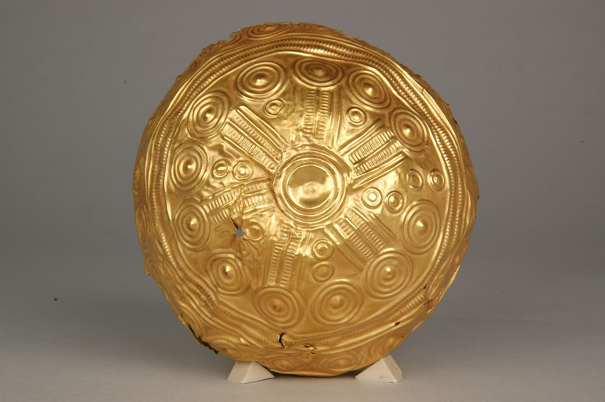 Blekingeguldskålen